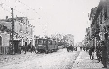 Capolinea tranviario di Falconara Marittima, davanti alla stazione.